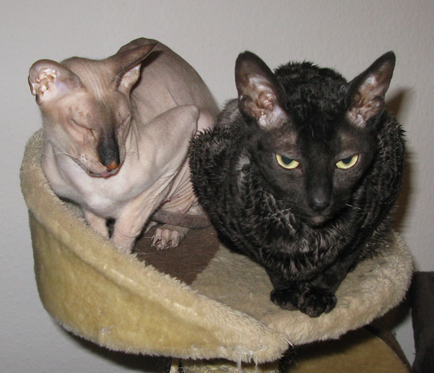 Deux chats domestiques (felis silvestris catus) dans un arbre à chat à Francfort-sur-le-Main : Yanek del Iris, de race peterbald, de l'élevage del Iris de Saint-Pétersbourg et Sansha, une chatte de race rex de Cornouailles, d'un élevage allemand.